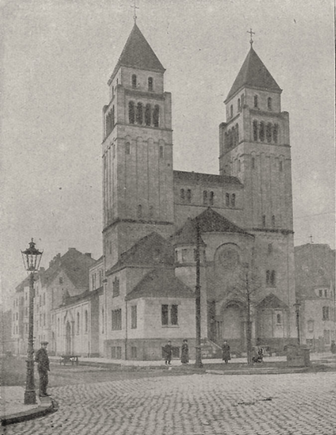 Die Heilige-Geist-Kirche in Düsseldorf, Moltkestraße, erbaut von Prof. Kleesattel. Foto Carl Tucht, 1911